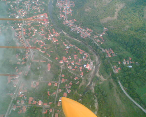 панорамна снимка на селото от 450м над село Дебнево (с делтапланер)